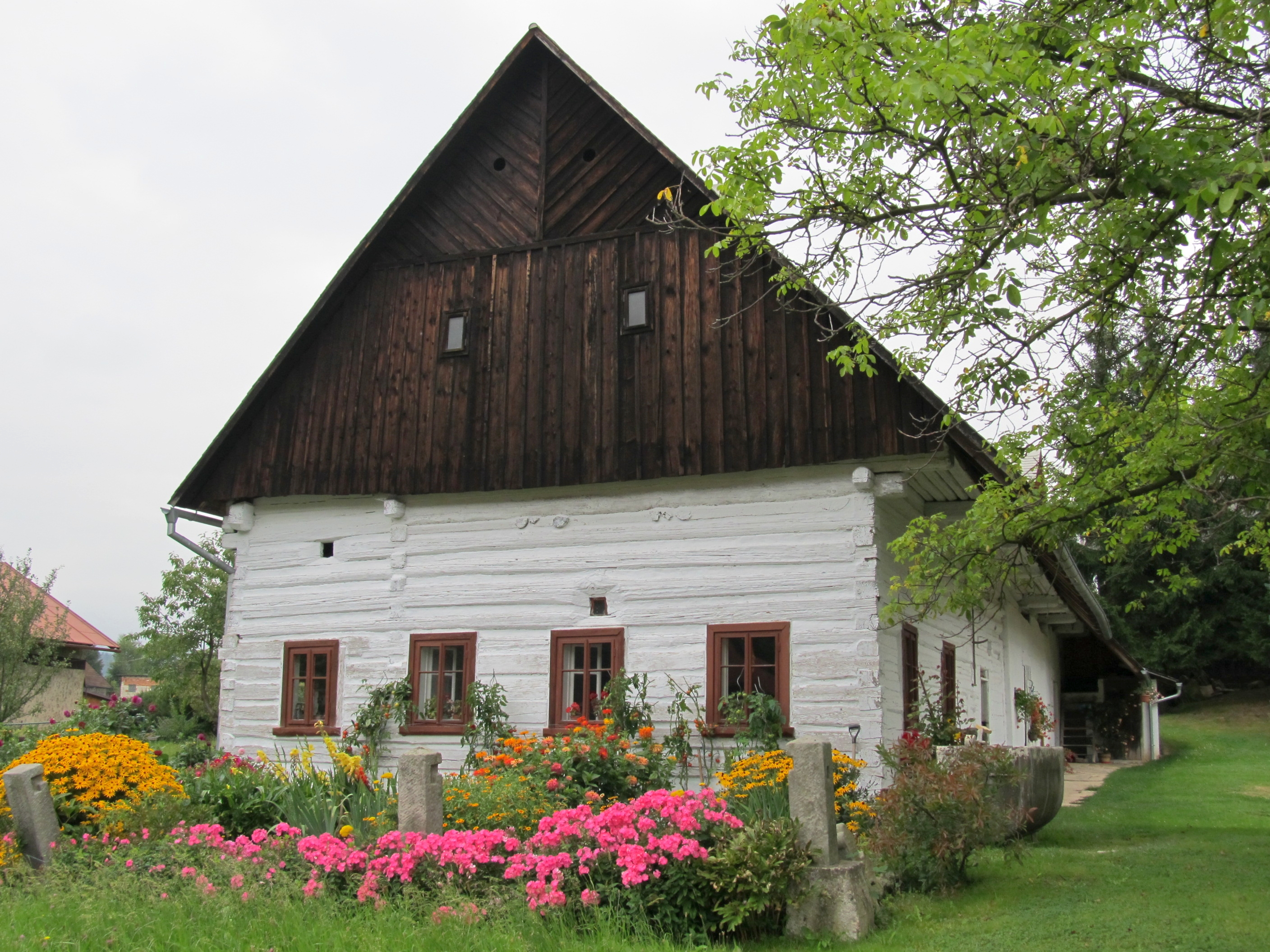 Venkovský dům (Rtyně v Podkrkonoší), Hronovská 53, Rtyně v Podkrkonoší